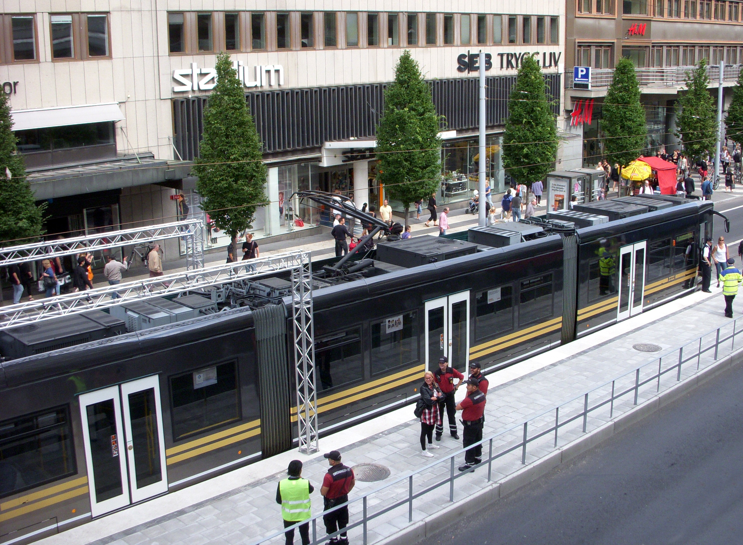 Spårväg City på Hamngatan i Stockholm, invigningsdagen den 21 augusti 2010